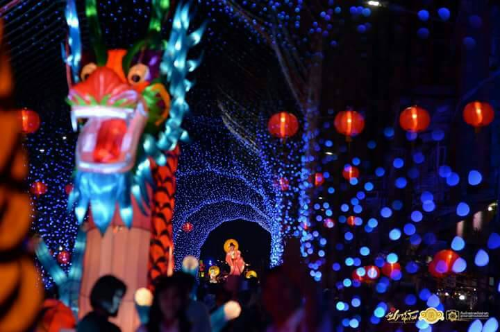 ตรุษจีนนครสวรรค์3